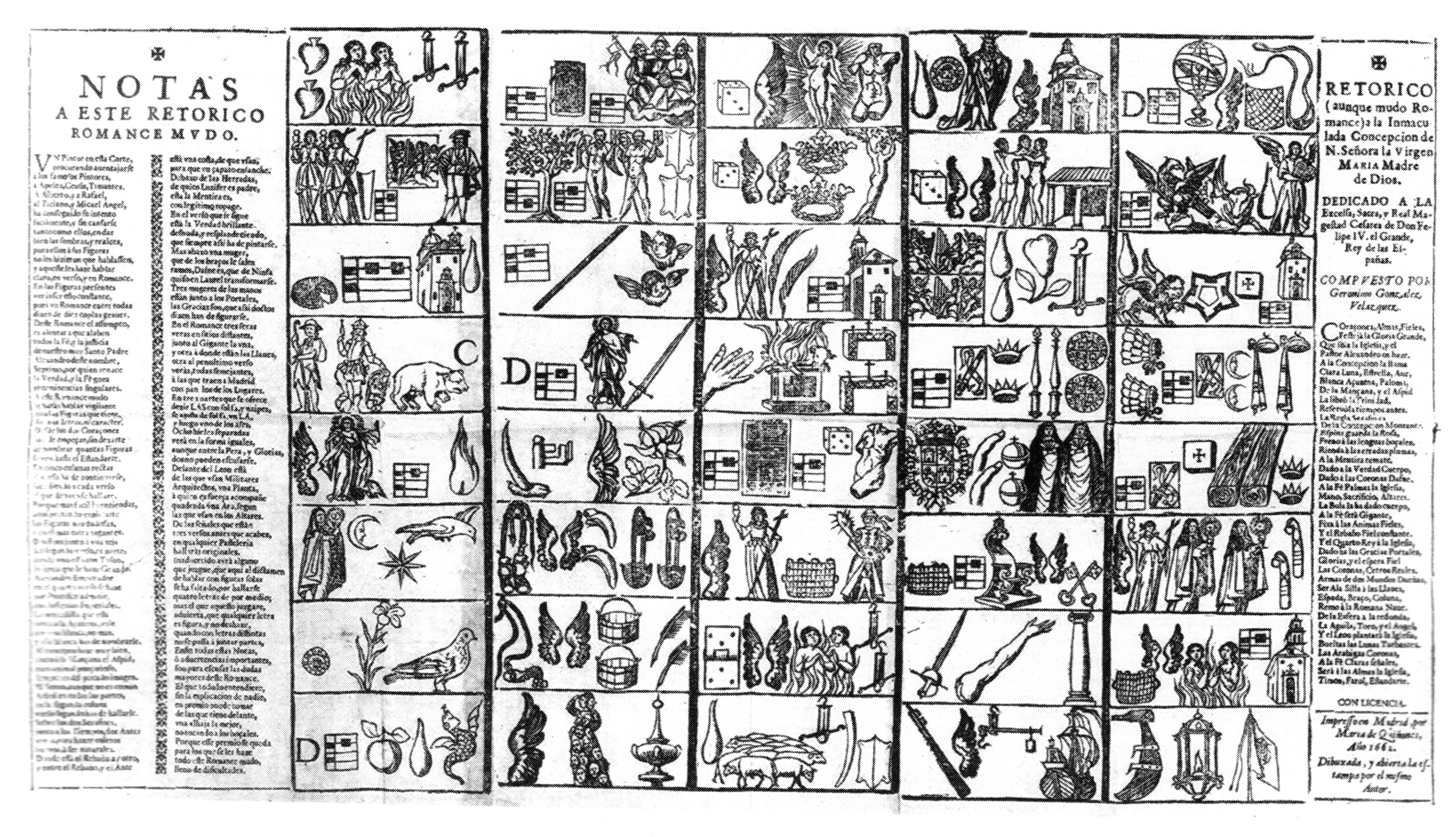 Retórico aunque mudo romance a la Inmaculada Concepción. Madrid, María de Quiñones, 1662, por Gerónimo González Velázquez. Entalladura (grabado español del siglo XVII). Biblioteca Nacional de Madrid (VE/ 181-32)